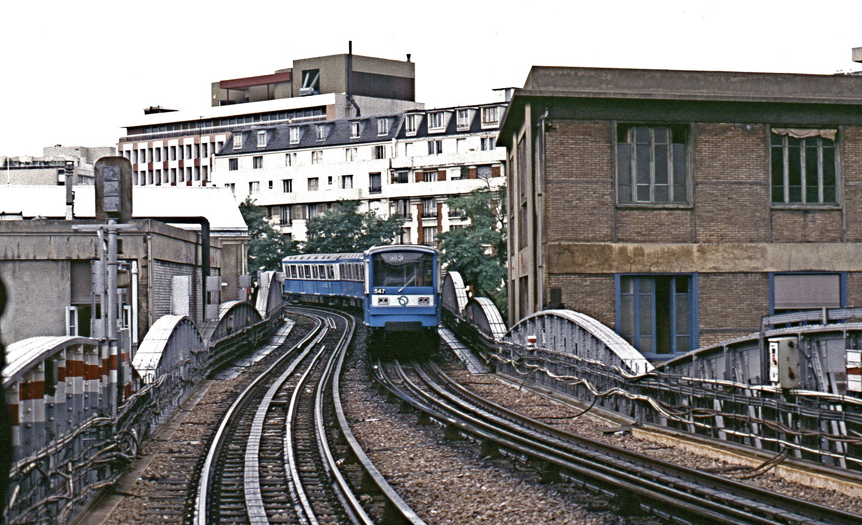 MF 67 près de la Gare d'Austerlitz